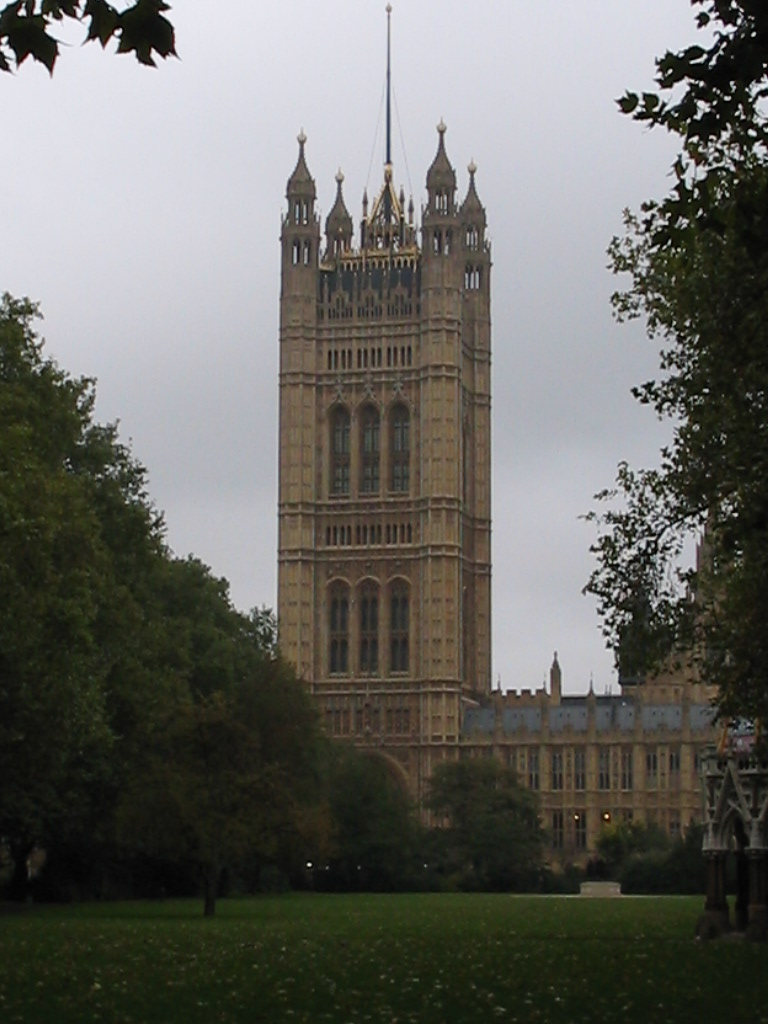 Victoria tower, Londen, oktober 2004